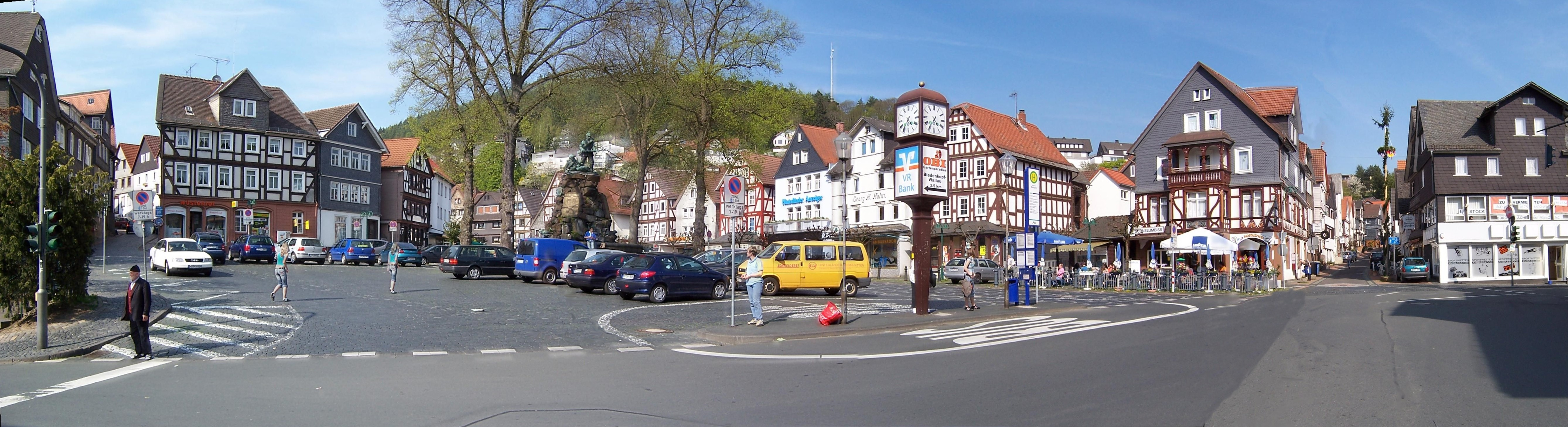 Der Marktplatz in Biedenkopf mit Kriegerdenkmal in der Mitte.